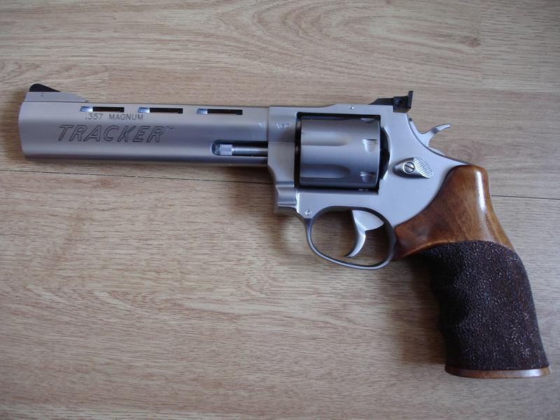 Taurus 627-KLM .357MAG (TRACKER)